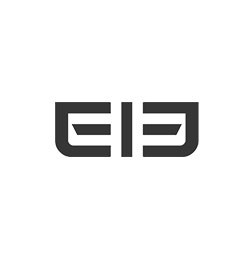 Логотип компании